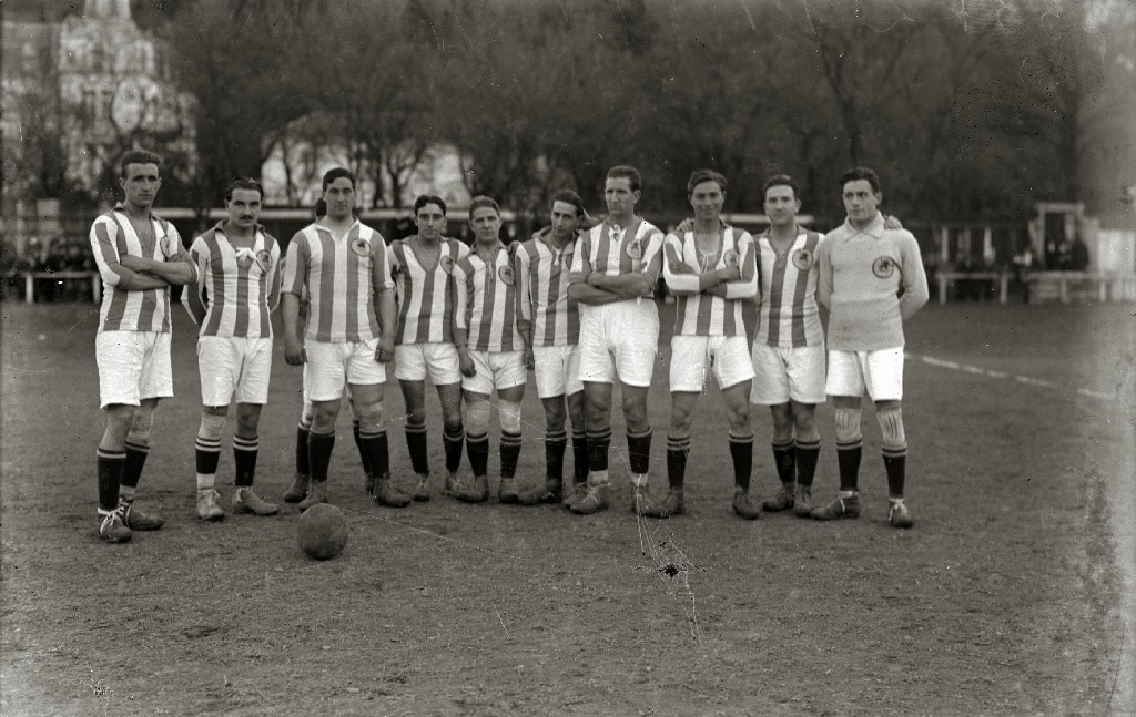 Título original: Partido de fútbol en el campo de Atotxa (3/4) Localización: San Sebastián (Guipúzcoa)